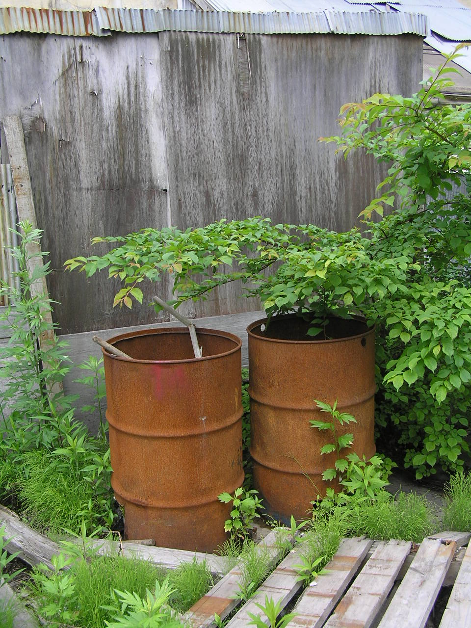 時を経たドラム缶・奔別炭鉱